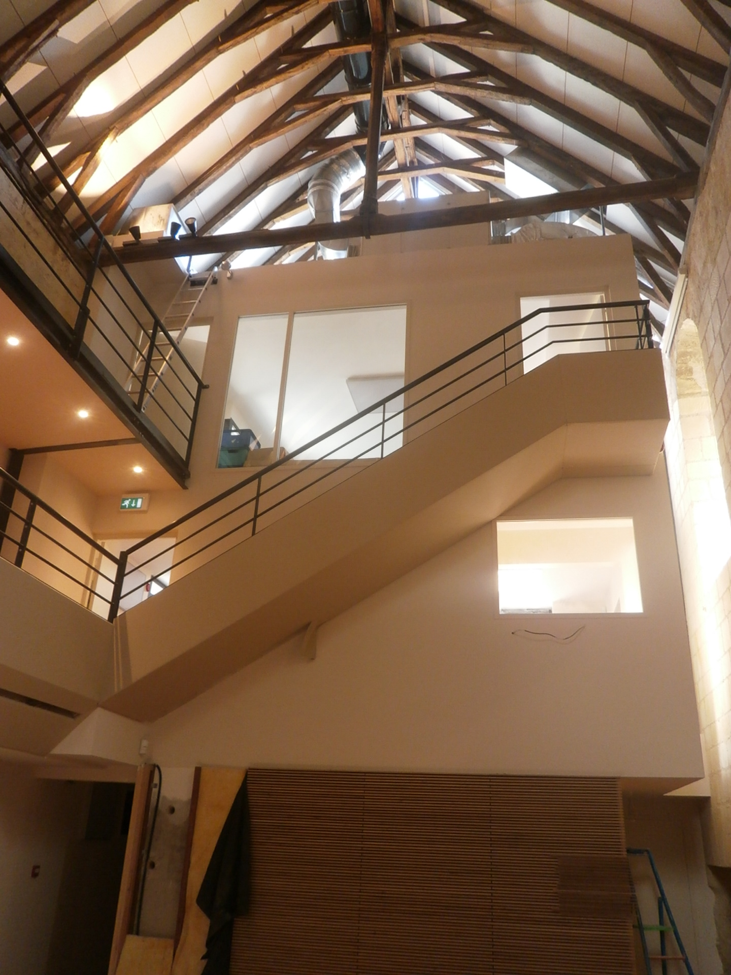 Le module moderne rajouté à l'est de la nef (vu de la nef)